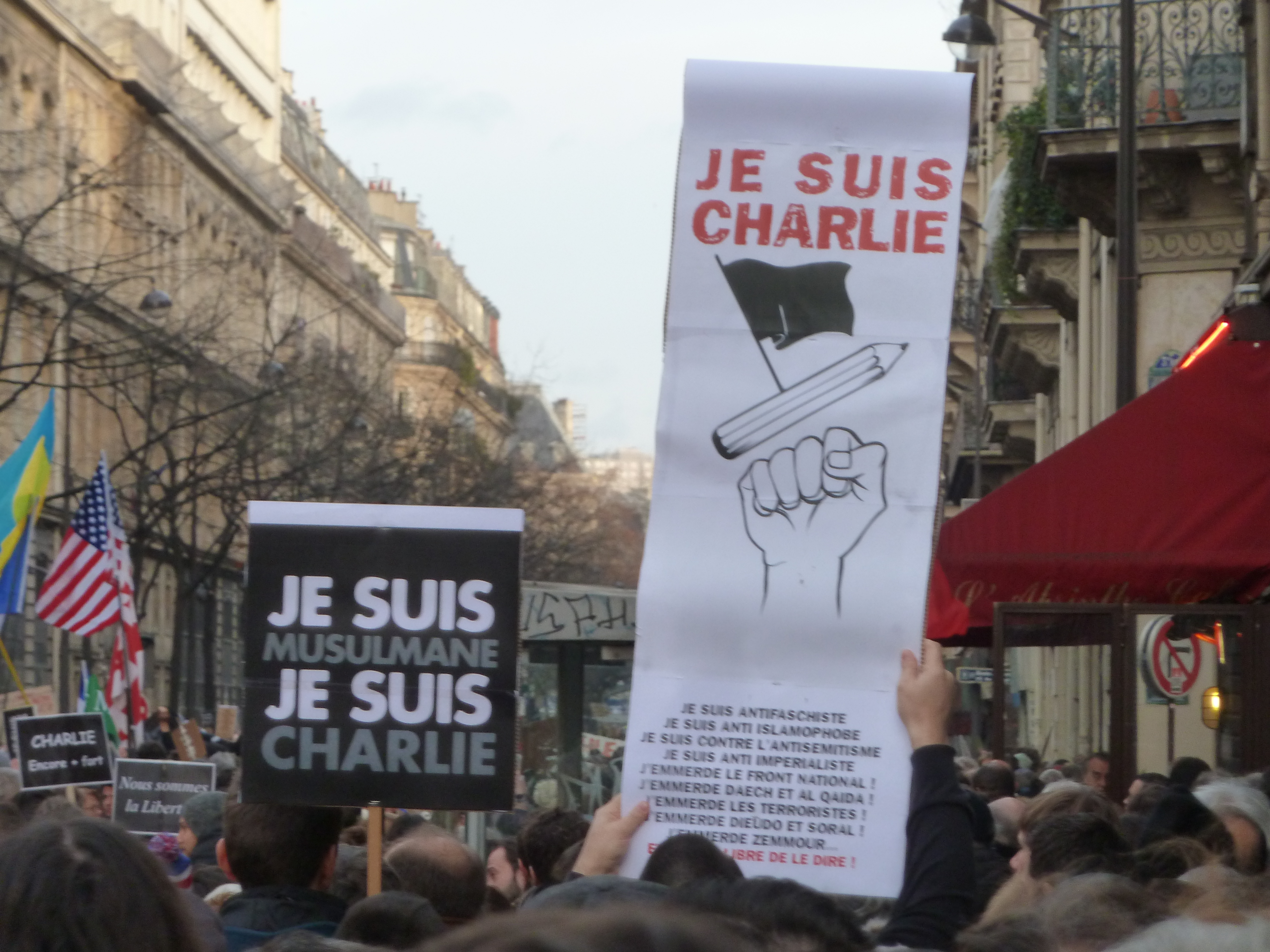 Marche républicaine, Paris. 11.01.2015